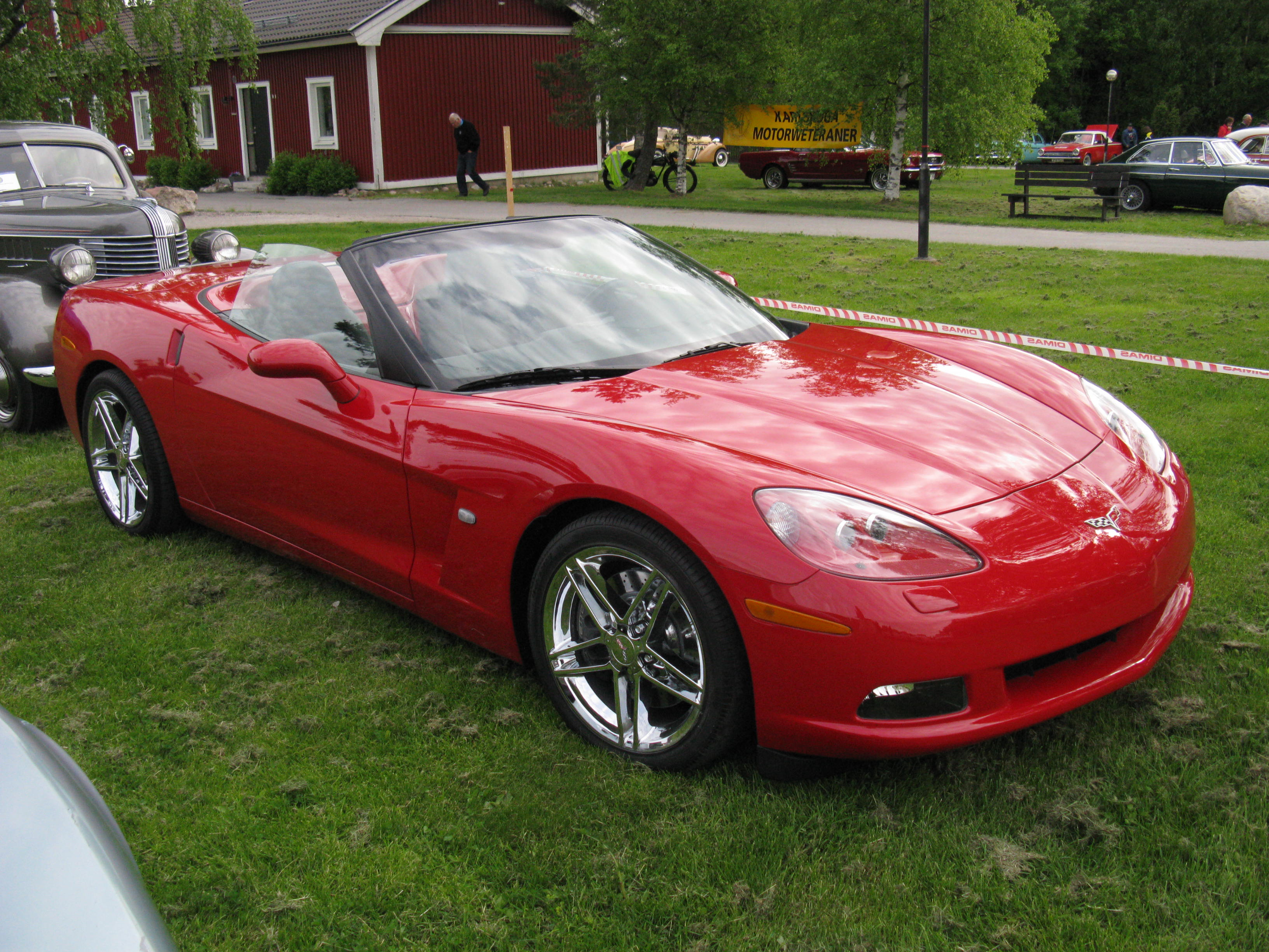 Chevrolet Corvette C6 Cabriolet